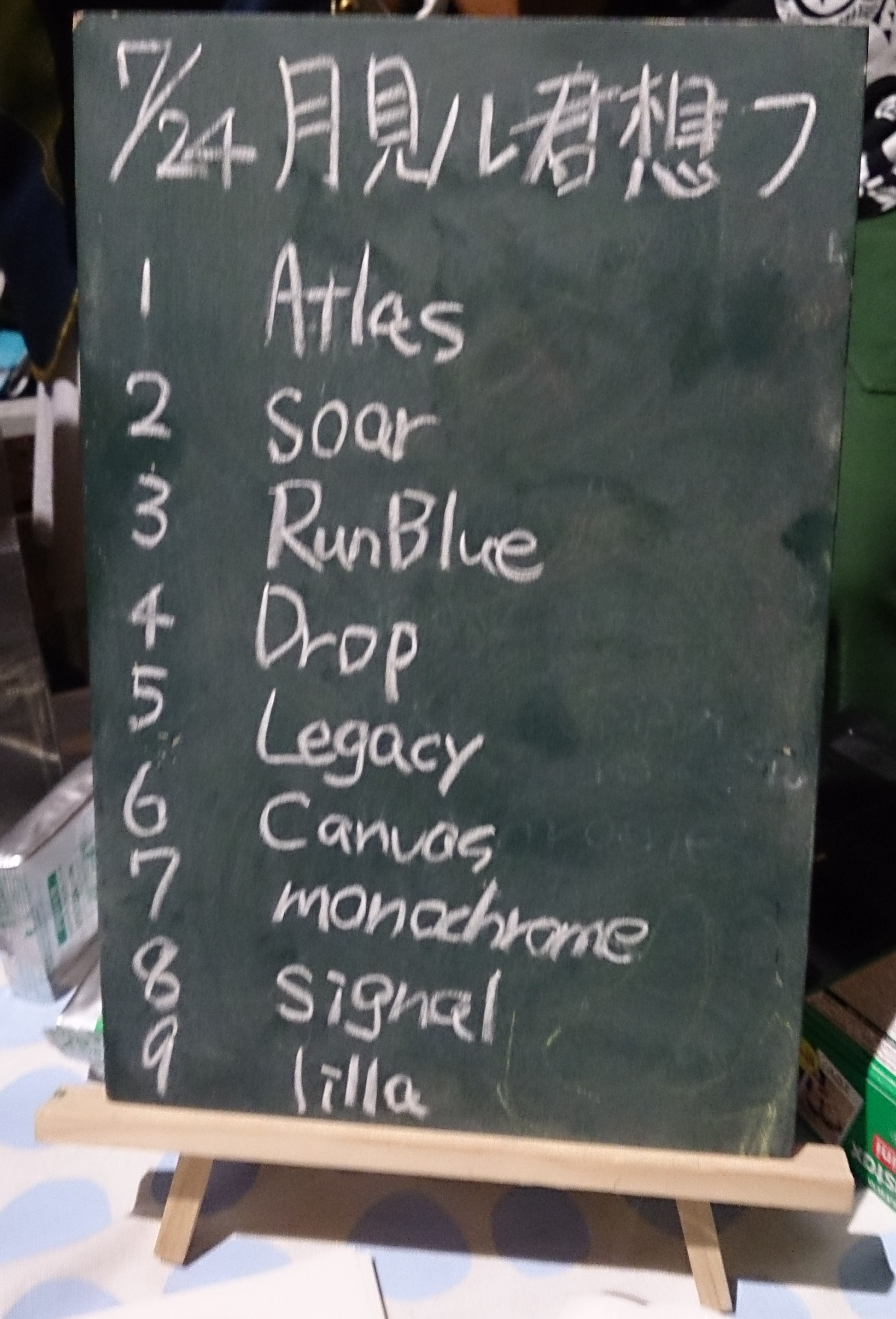 amiinAセトリボード(20160724(1))